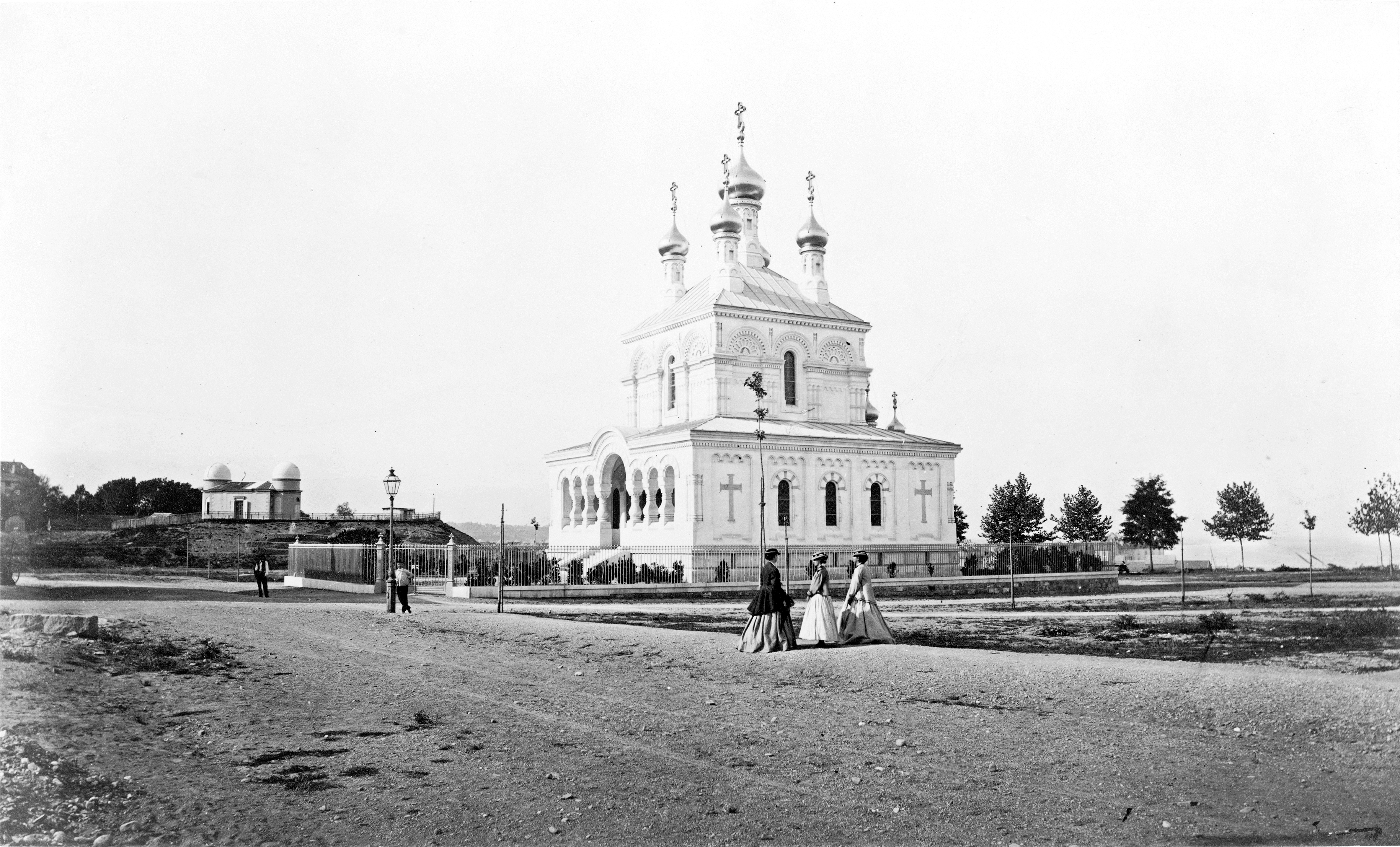 Крестовоздвиженский храм в Женеве. XIX век